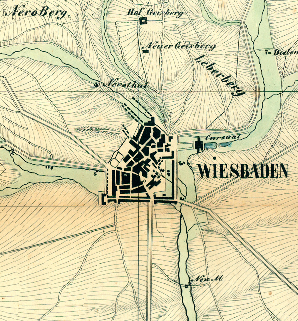 Ausschnitt der Stadt Wiesbaden aus der Karte vom Herzogthum Nassau : von den im Jahr 1819 geschehenen Aufnahmen längs der Preussischen und Hessischen Gränzen etc. ; orientirt nach Parallelen vom Meridian und Perpendikel von Paris